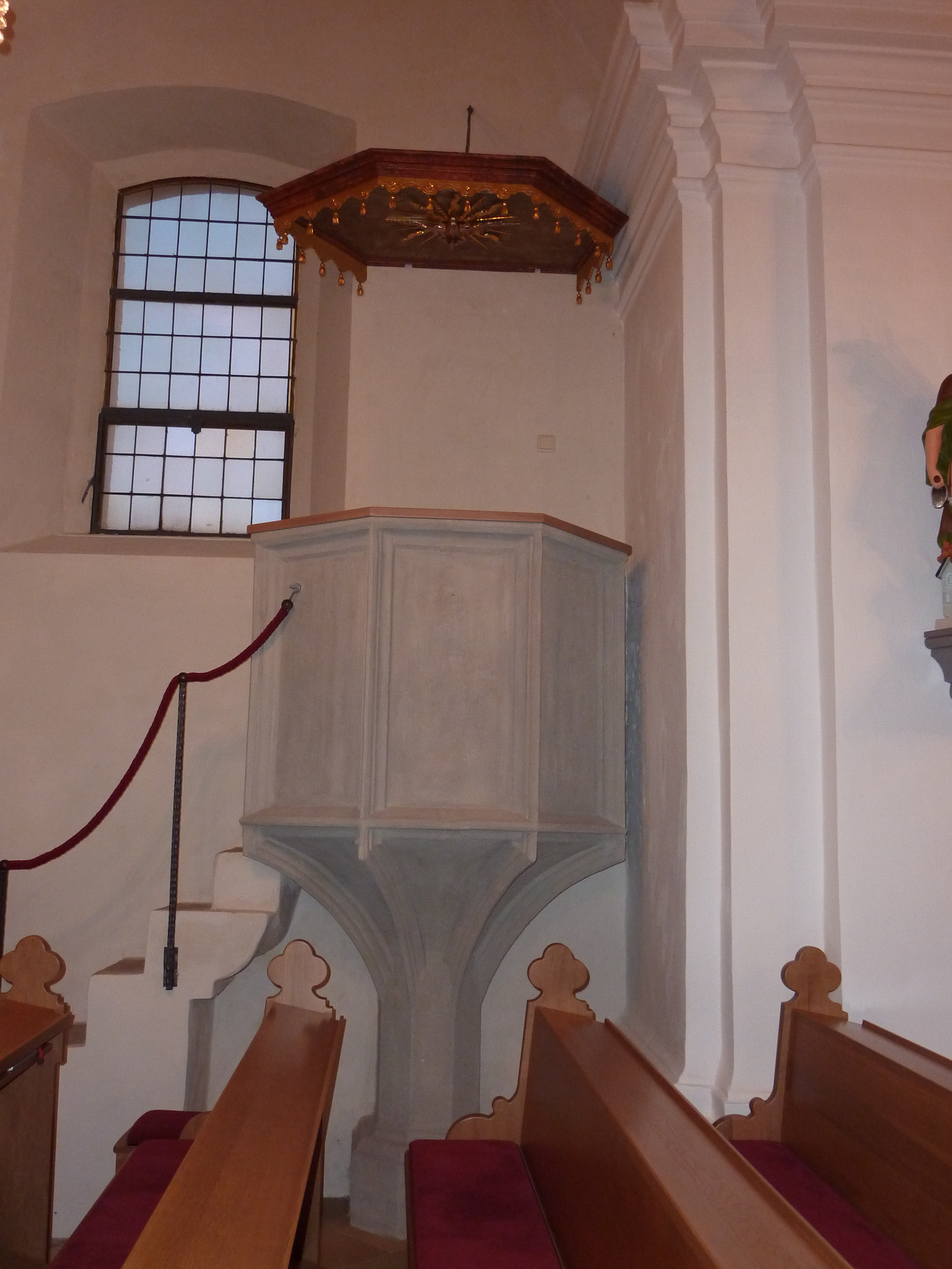 Pfarrkirche hl. Johannes der Täufer, Am Kirchenberg, Gerolding, Dunkelsteinerwald, Niederösterreich - Spätgotische Stehkanzel (2. Hälfte 15. Jh.)